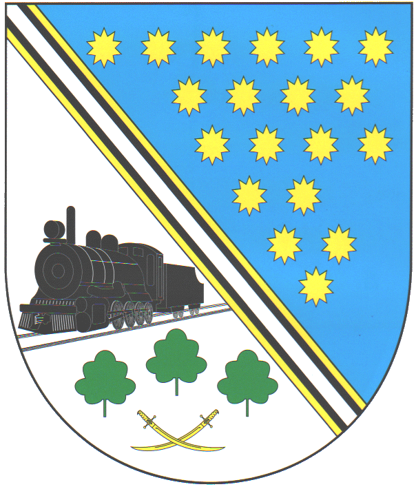 Герб П'ятихатського району